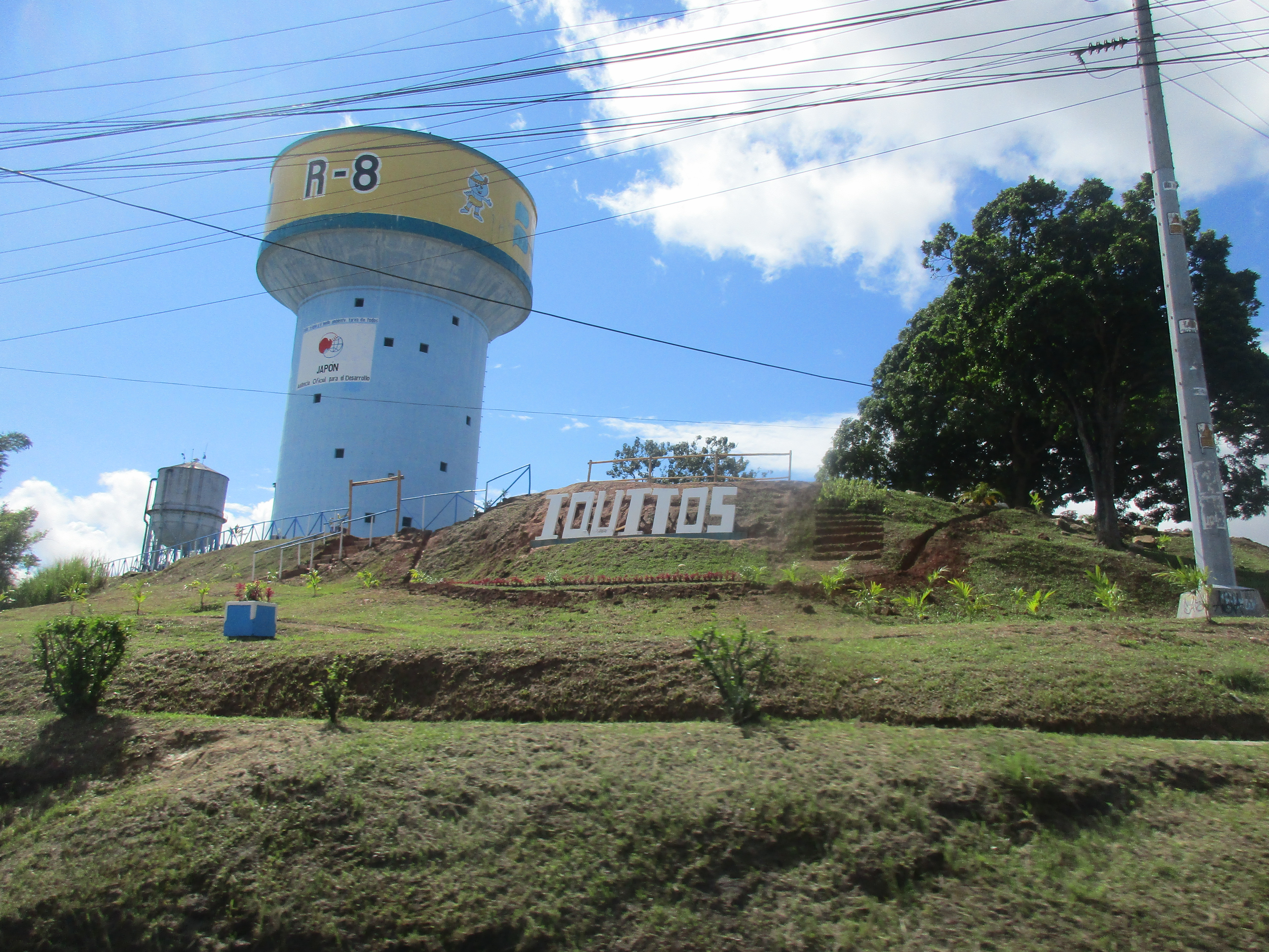 Cerro Palmeras